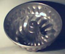 Flanera